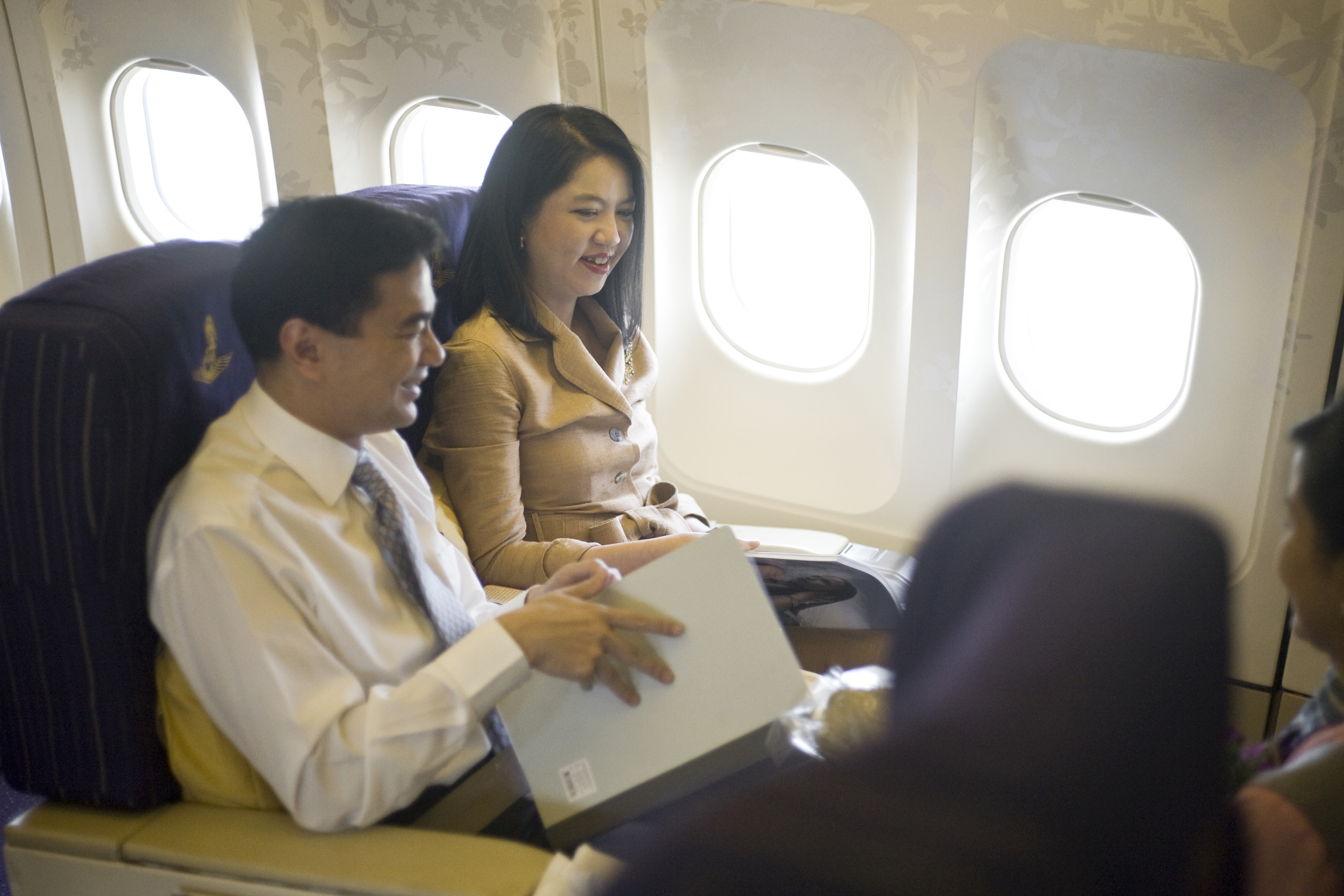 นายกรัฐมนตรีและคณะ เข้าร่วมประชุม APEC CEO Summit 2009 และร่วมอภิปรายหัวข้อ "Are our present models of regionalism such as APEC and ASEAN adequate?" ระหว่างวันที่ 13-15 พฤศจิกายน 2552 13พฤศจิกายน2552 (The Official Site of The Prime Minister of Thailand Photo by พีรพัฒน์ วิมลรังครัตน์)